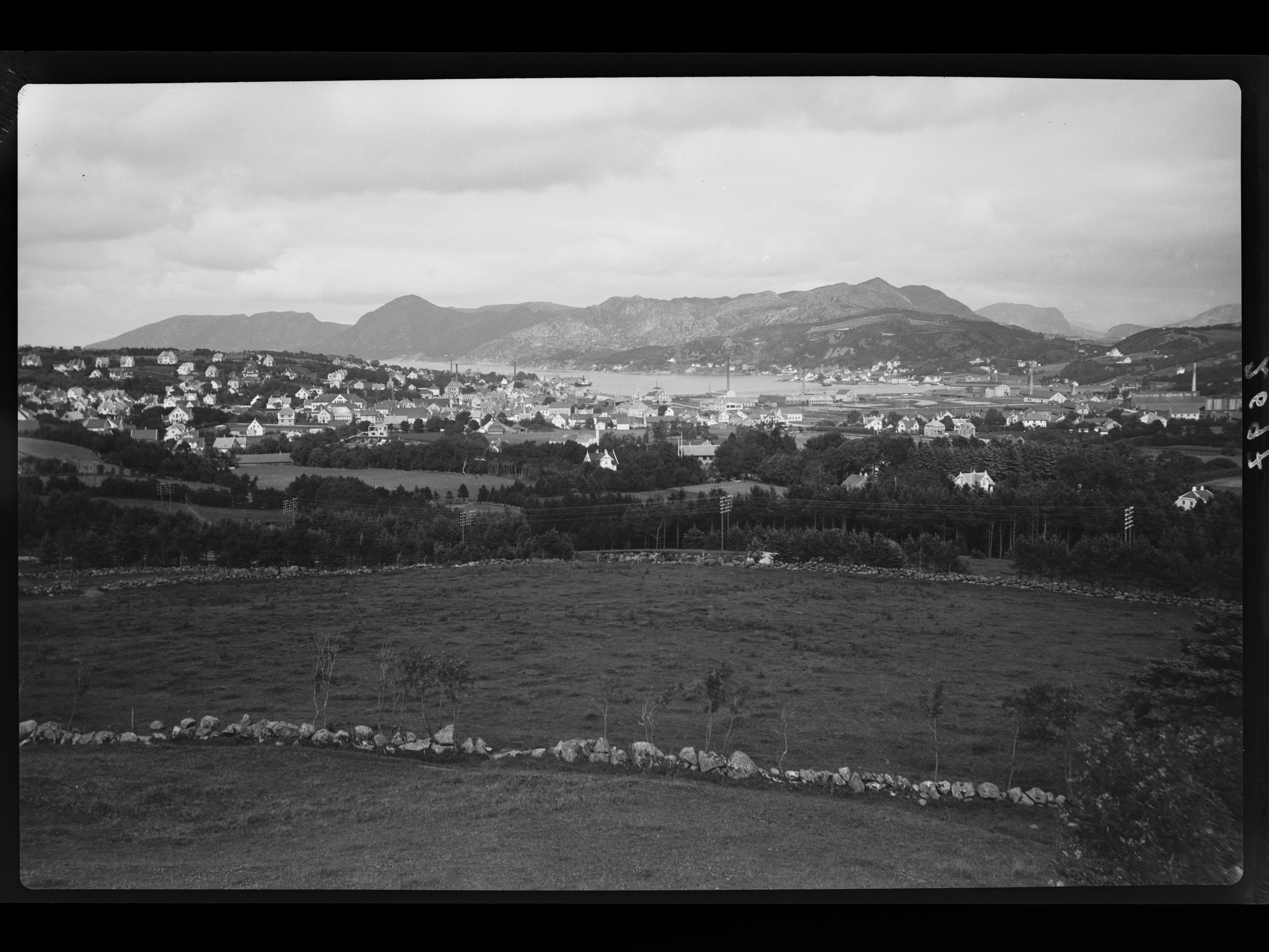 Bildet er hentet fra Nasjonalbibliotekets bildesamling. Anmerkninger til bildet var: Fotograf ukjent. Sandnes, Sandnes, Rogaland